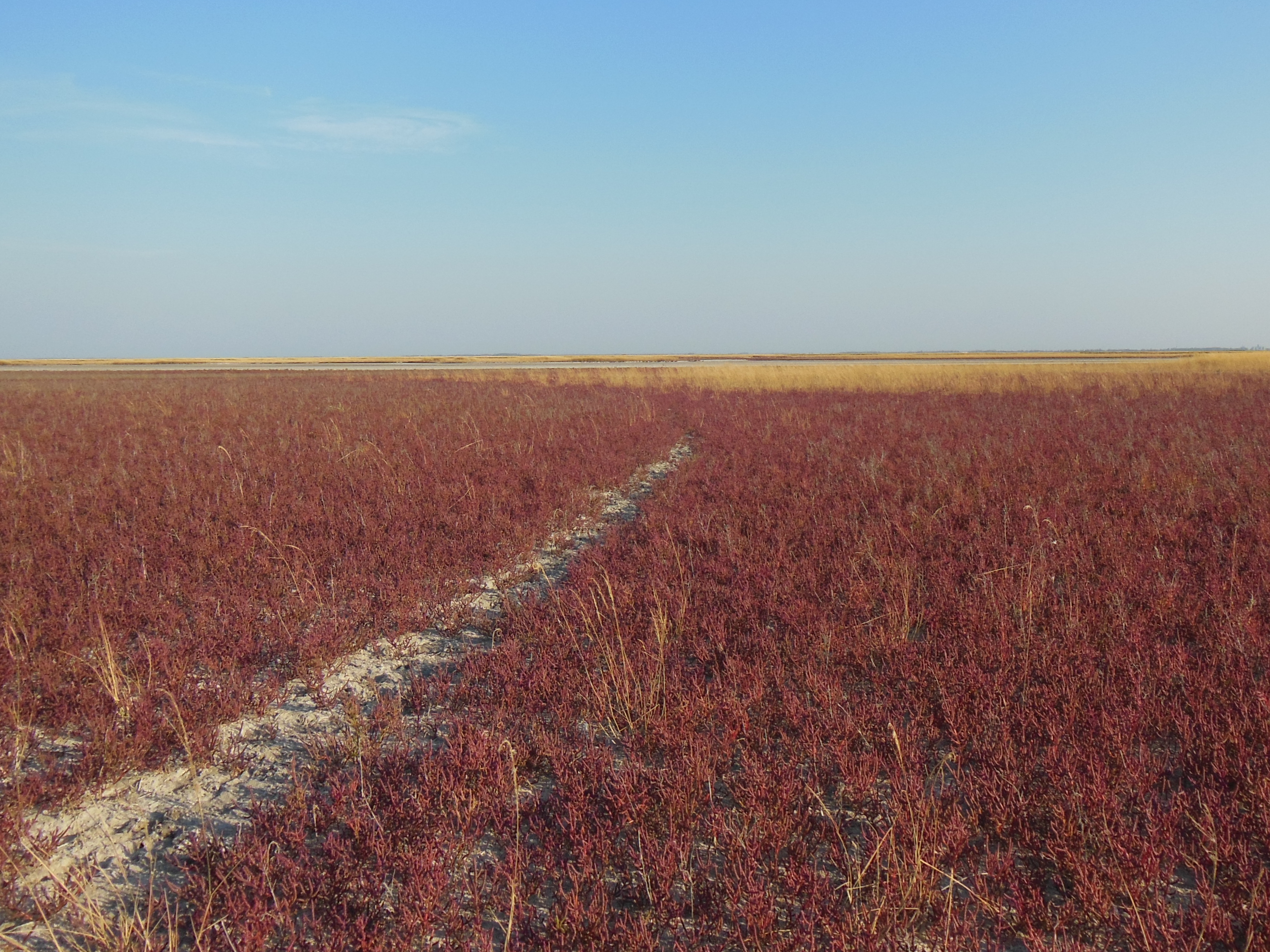 Знято під час експедиції на о. Джарилгач This photo/video of Dzharylhach was taken during Wikiexpedition to Dzharylhach supported by Wikimedia Ukraine. You can see all photographs in category Category:Wikiexpedition to Dzharylhach. English | українська | +/−